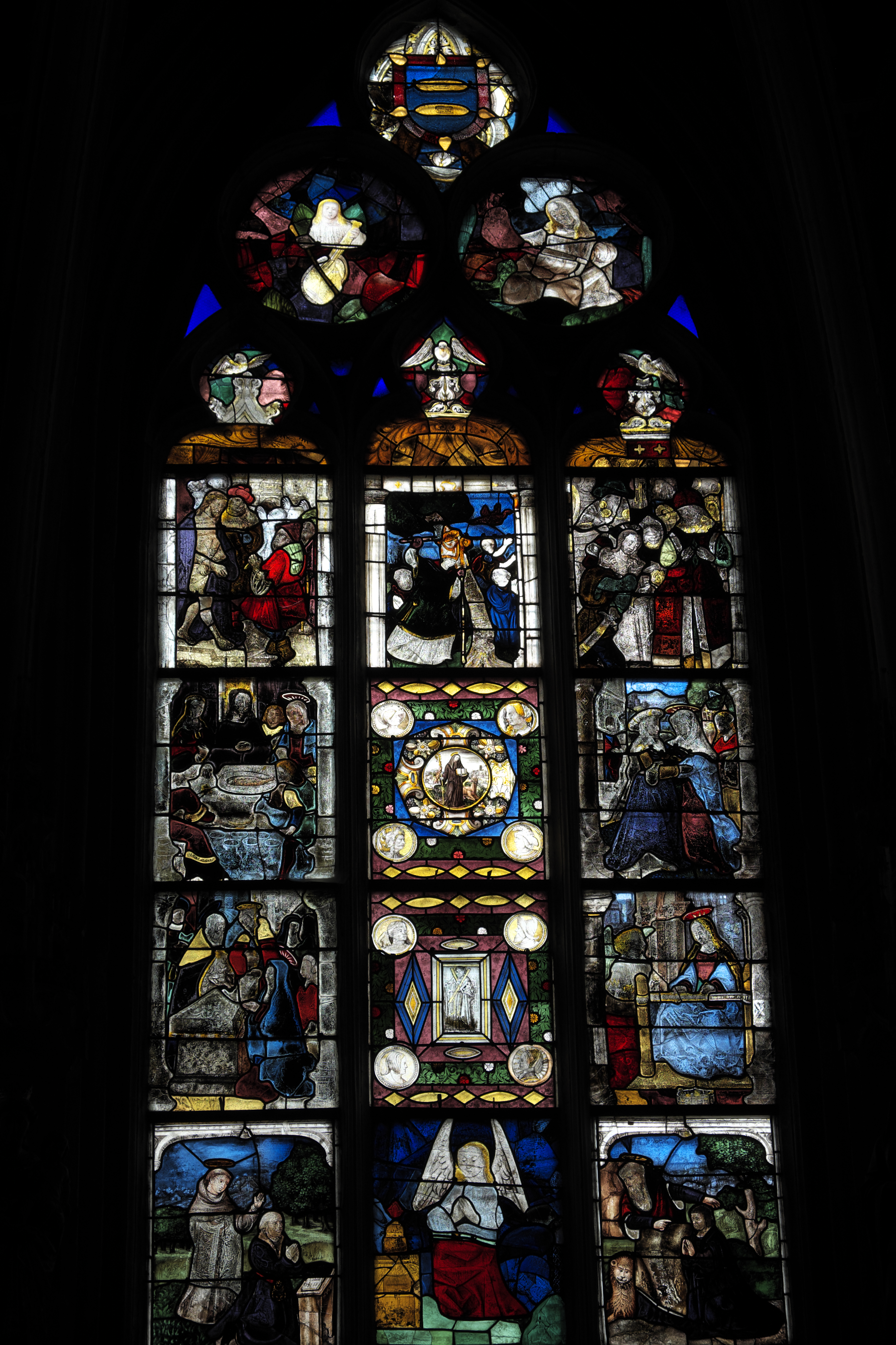 Katholische Pfarrkirche Notre-Dame-des-Marais in La Ferté-Bernard im Département Sarthe (Pays de la Loire/Frankreich), Bleiglasfenster (baie 10), mit Fragmenten aus dem späten 15., dem 16. und dem frühen 17. Jahrhundert; Darstellung: Szenen aus dem Leben Jesu und Marias